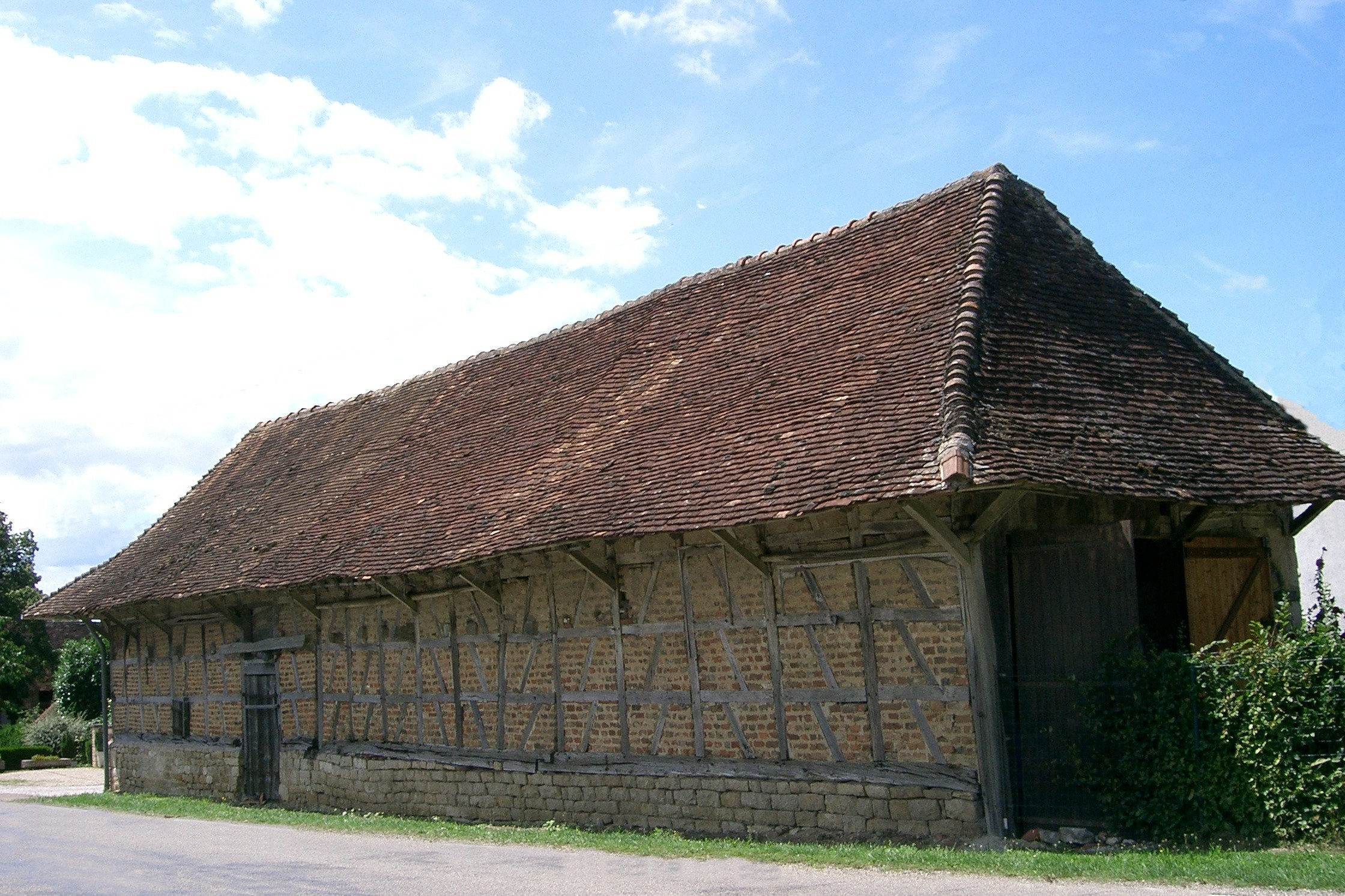 Sens-sur-Seille - ferme bressane (Saône-et-Loire - France)